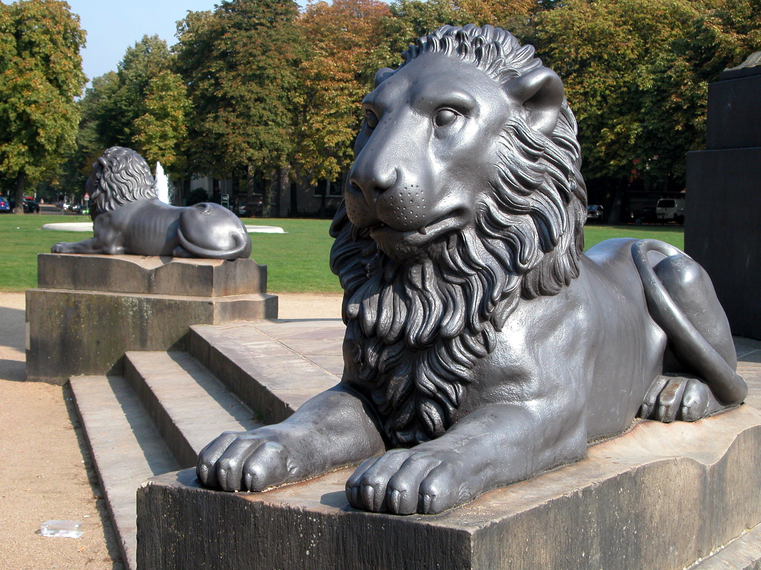 Auf dem Löwenwall in Braunschweig: Zwei von vier Bronzelöwen von Johann Gottfried Schadow um 1822 geschaffen. Ein fünfter Löwe wurde für den Löwenbrunnen verwendet.